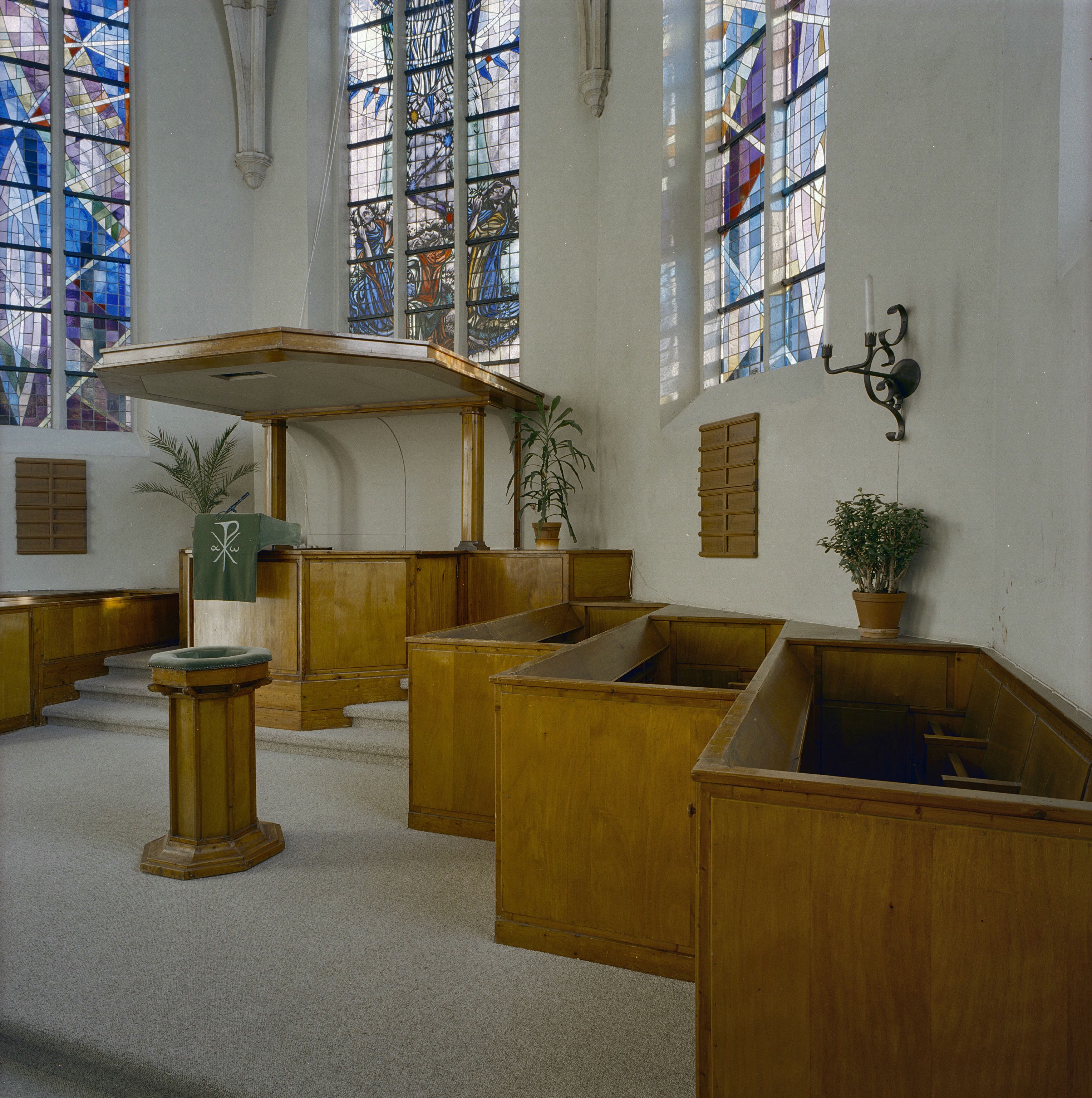 Hervormde Sint Joriskerk: Interieur koor, preekstoel, banken en doopvont